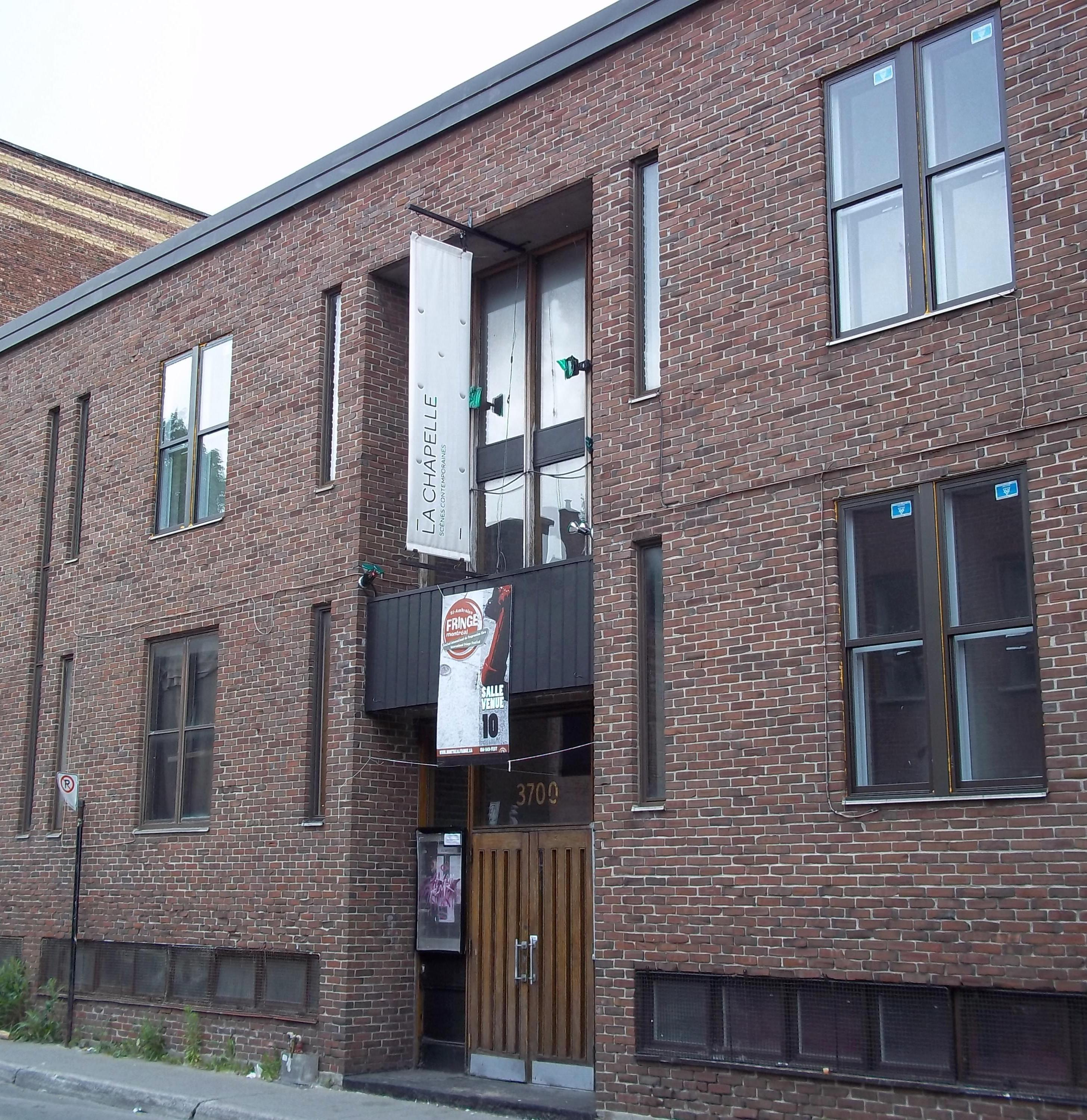 Théâtre La Chapelle, 3700, rue Saint-Dominique, Montréal